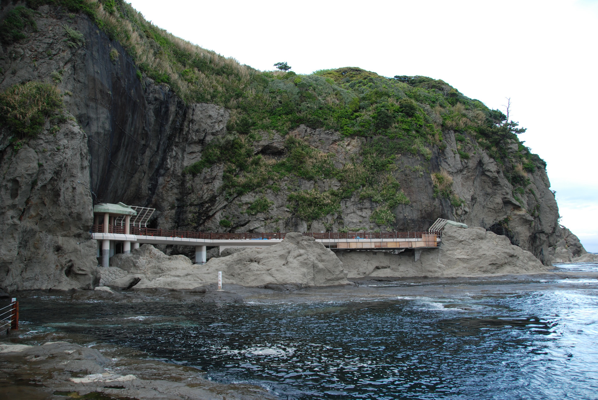 2 Chome-5 Enoshima, Fujisawa-shi, Kanagawa-ken 251-0036, Japan